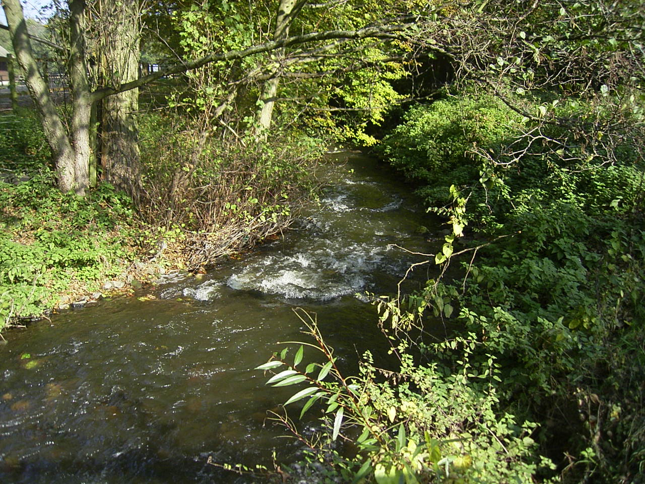 Der Lindebach bei der Hintersten Mühle in Neubrandenburg